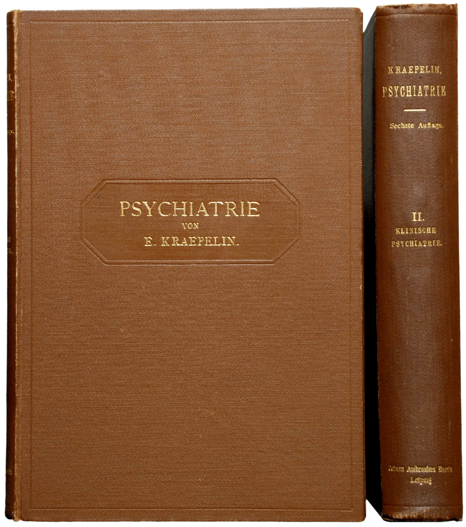 Kraepelin, Emil: Psychiatrie. Ein Lehrbuch für Studirende und Aerzte. Leipzig: J. A. Barth 1899. Sechste, vollständig umgearbeitete Auflage. 2 Bde. 362 Seiten, 607 Seiten.